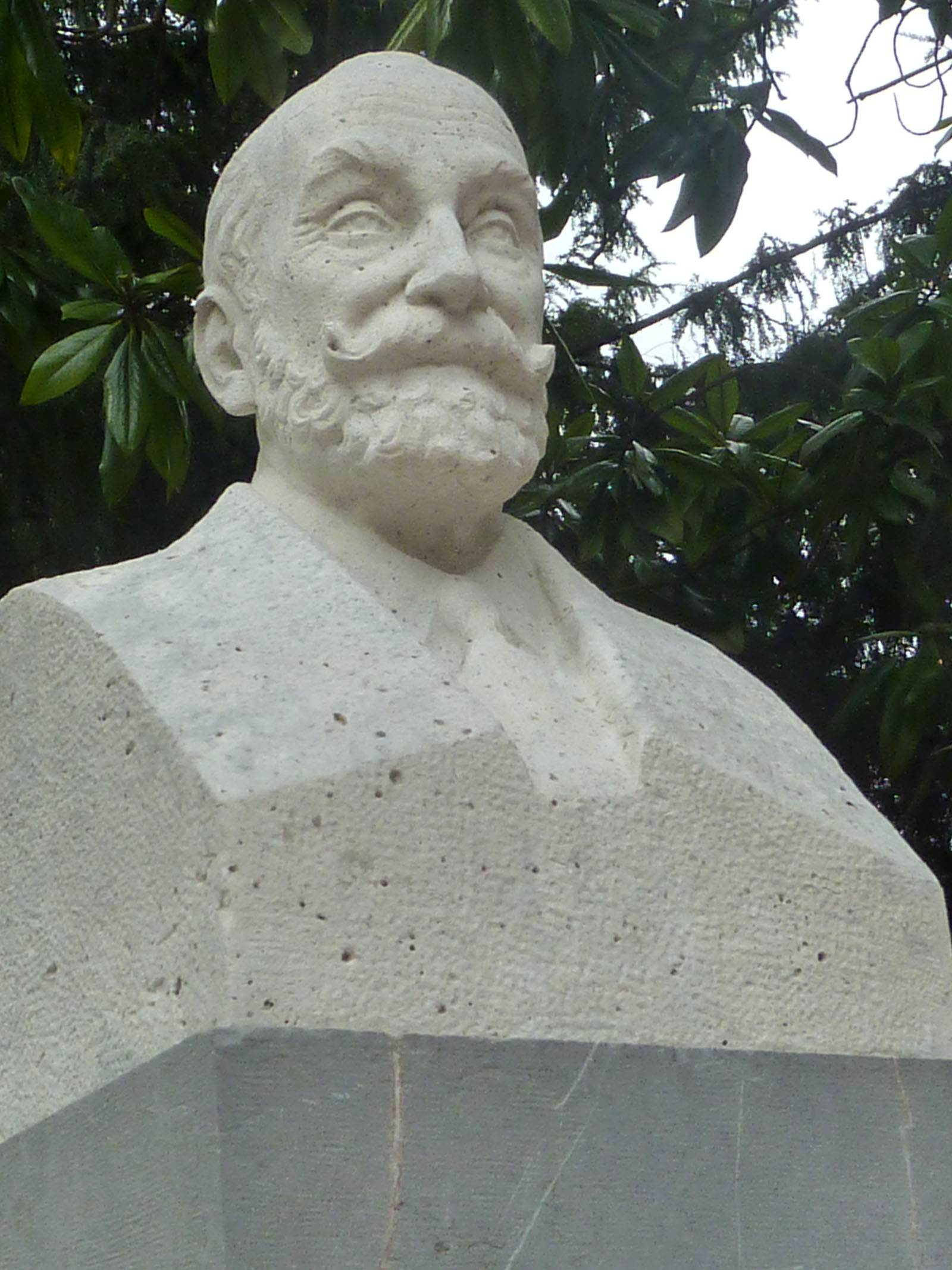 Oviedo